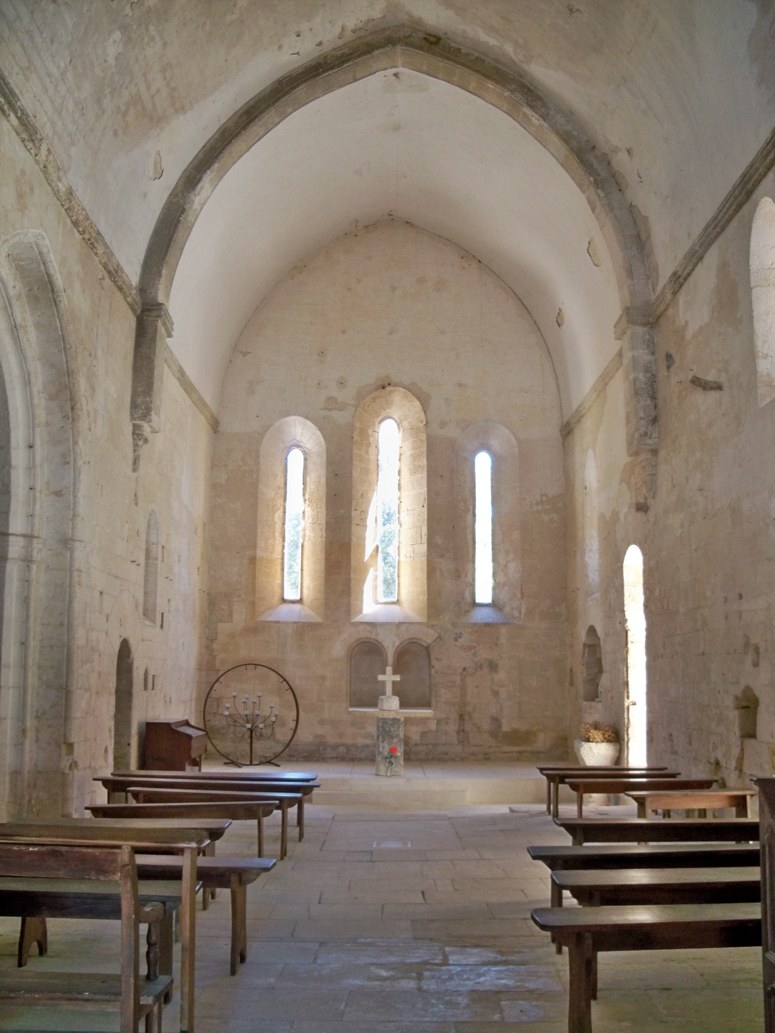 Nef de l'Abbaye de Saint Hilaire de Ménerbes, Vaucluse, France